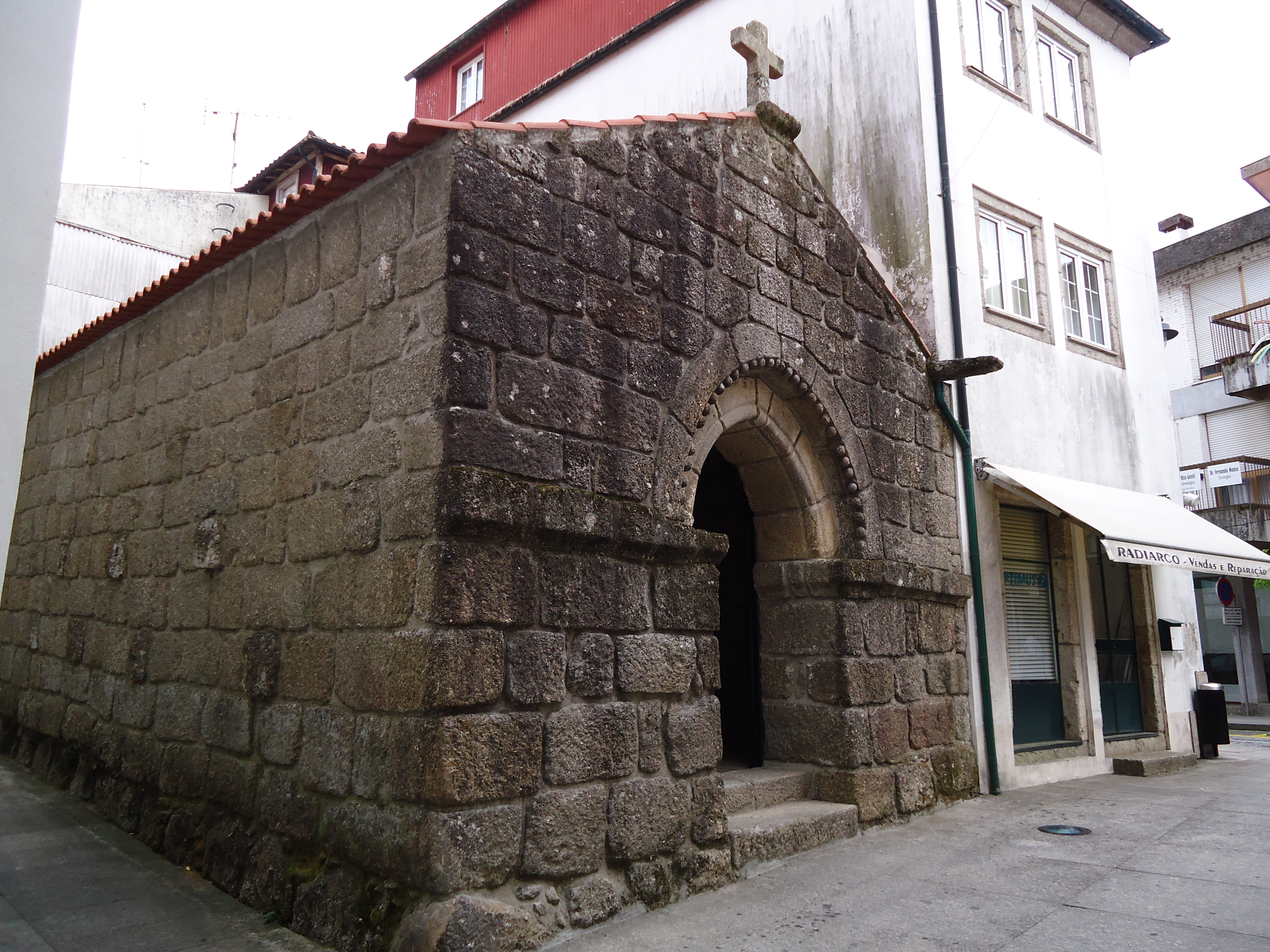 Capela de Nossa Senhora da Conceição (Capela da Praça), Arcos de Valdevez, distrito de Viana do Castelo, Portugal: vista da fachada.